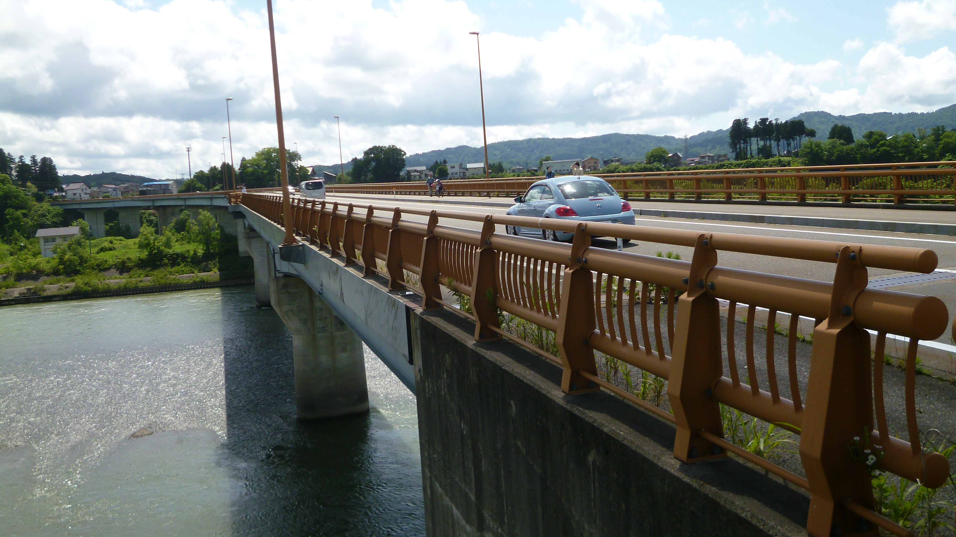 山本山大橋。右岸より撮影。